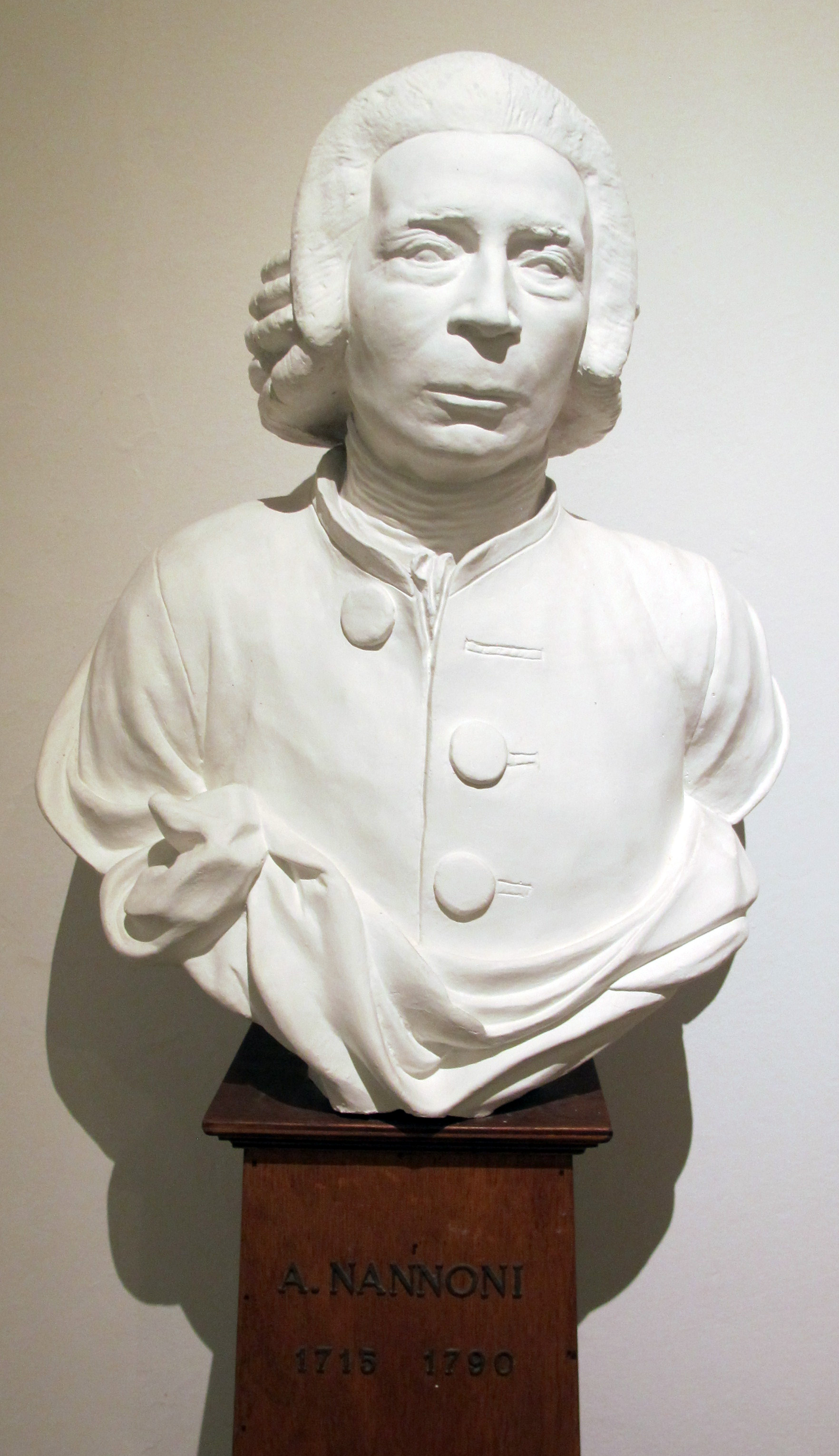 Istituto di anatomia patologica, museo, busto angelo nannoni